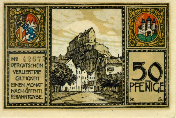 Notgeld der Stadt Burghausen aus dem Jahre 1918, Nennwert 50 Pfennig, Vorderseite